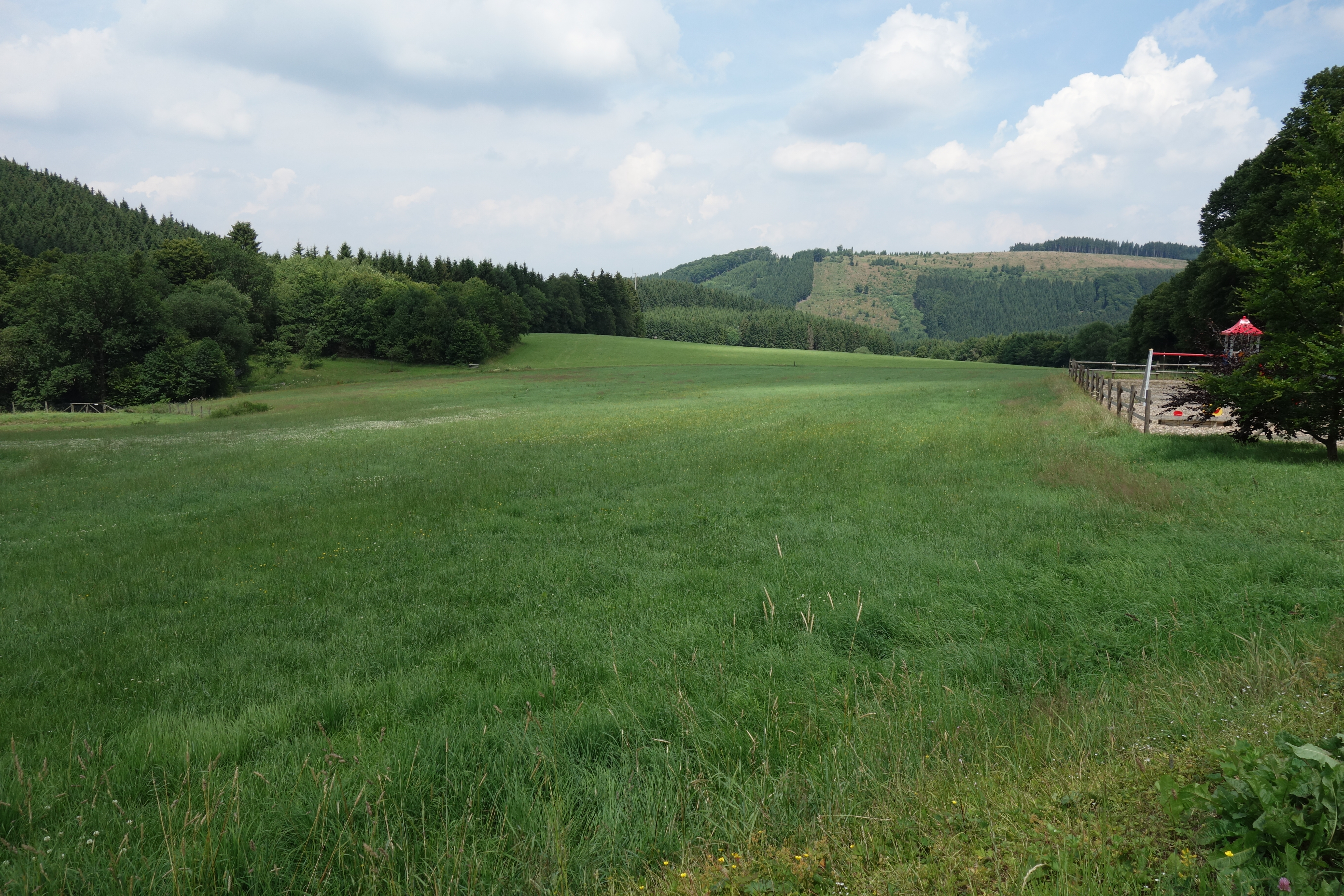 Landschaftsschutzgebiet Restgrünland um Gellinghausen und Offenlandinseln südlich Gellinghausen bis Rimberg (hier Blick von Hotel Rimberg nach Osten). Wald gehört zum Landschaftsschutzgebiet in Schmallenberg Südost